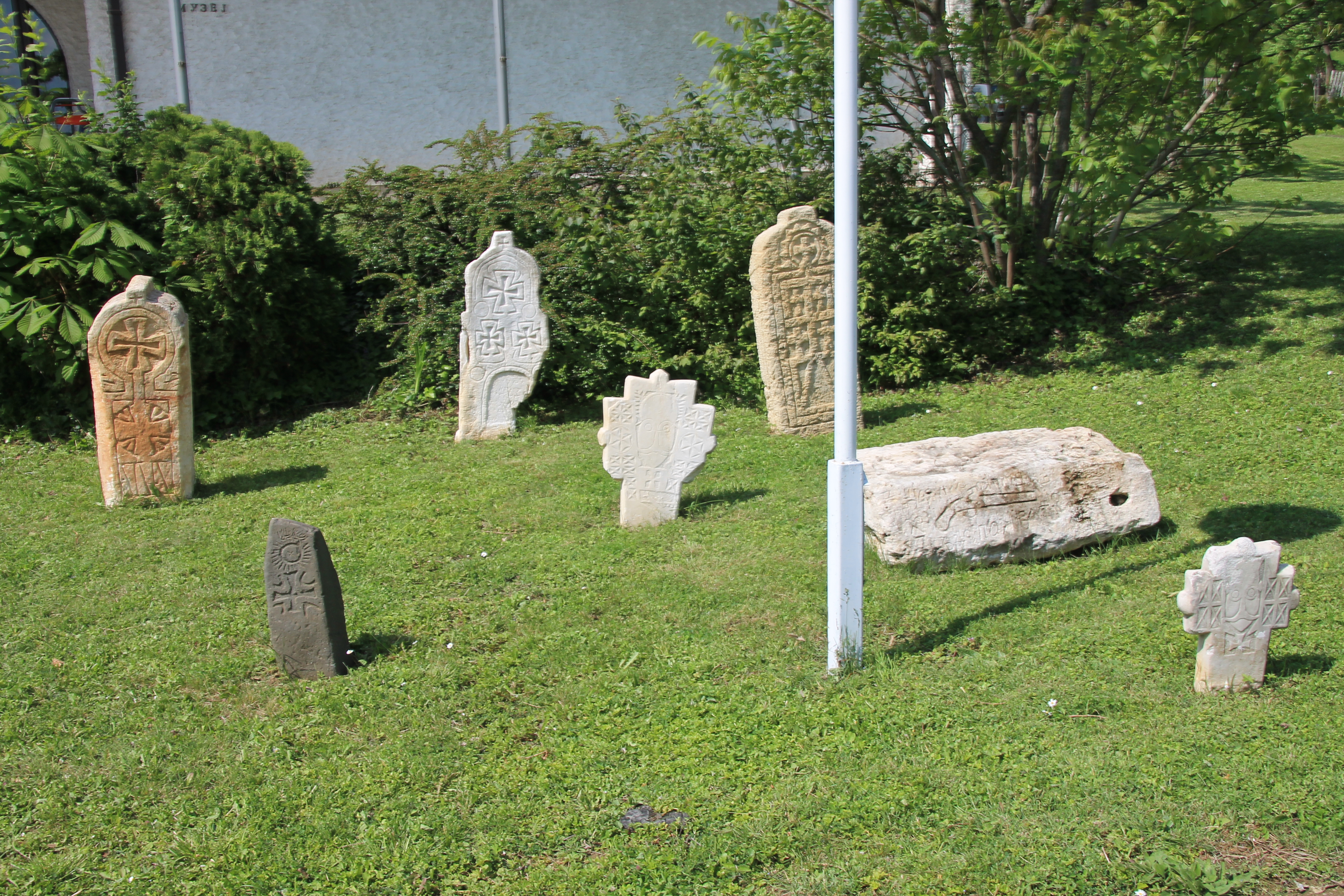 Narodni muzej Aranđelovac